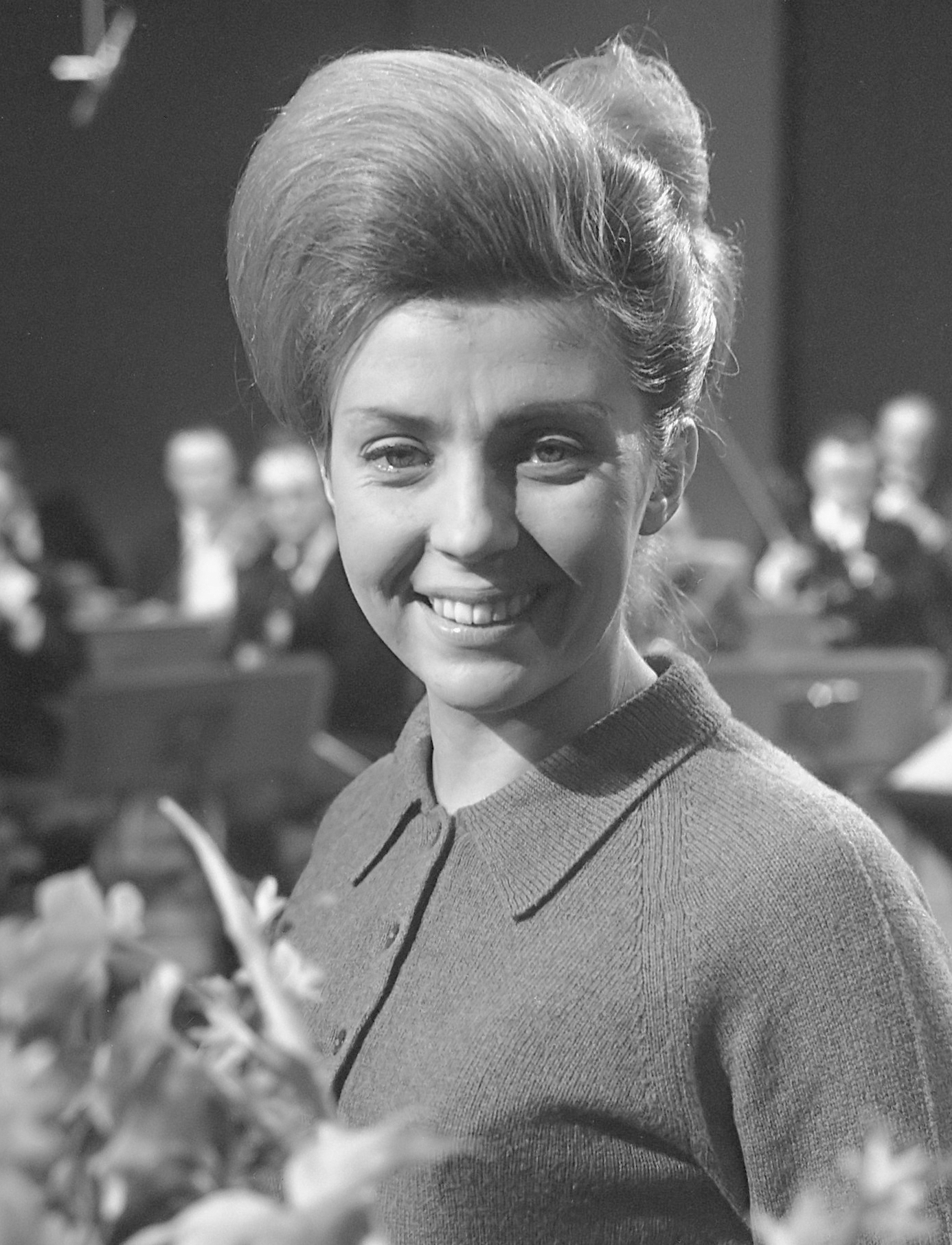 Nationaal Songfestival 1966, Helen Shepherd 5 februari 1966